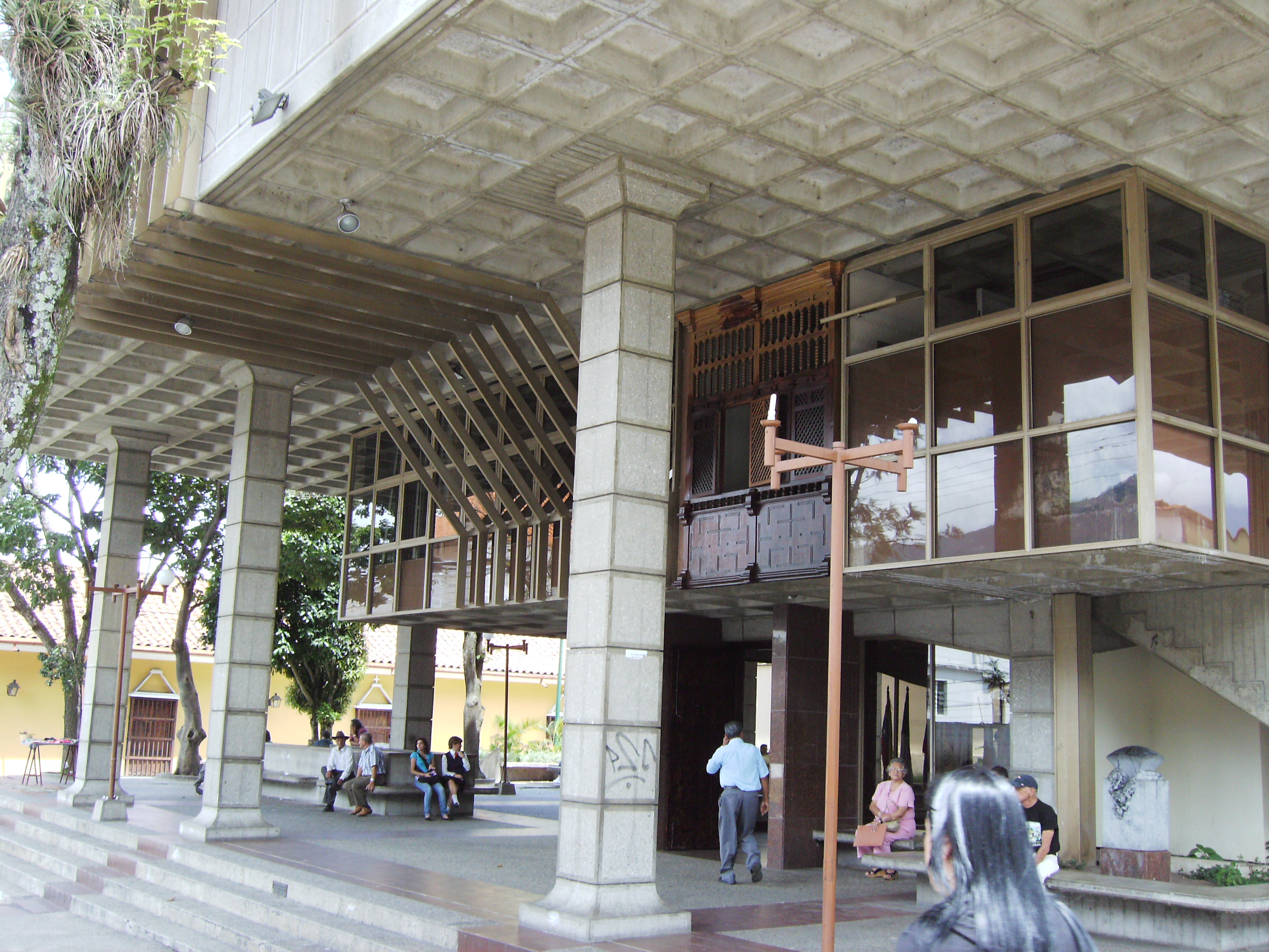 Vista esterna della Biblioteca Bolivariana de Mérida